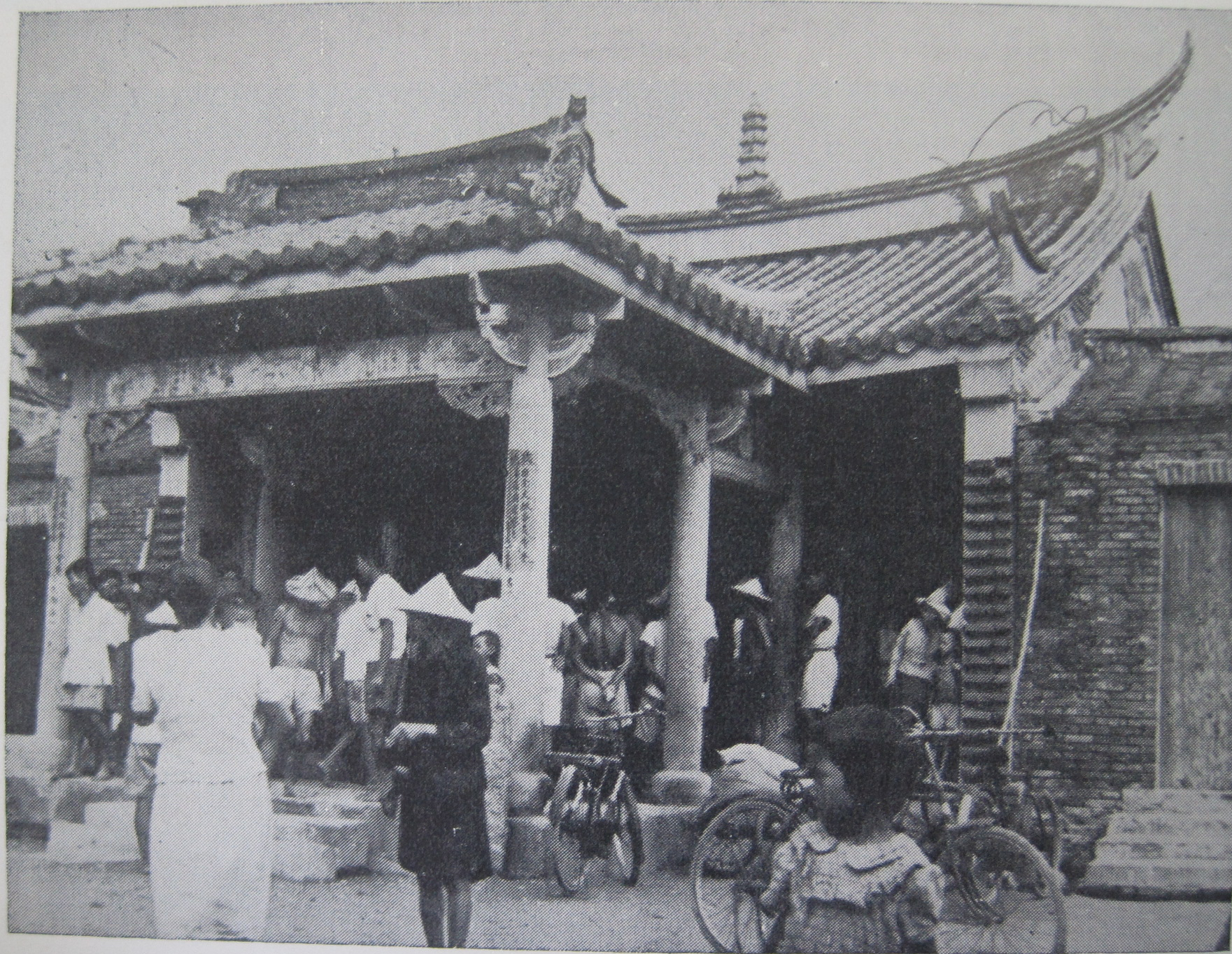 改建前的土城聖母廟。